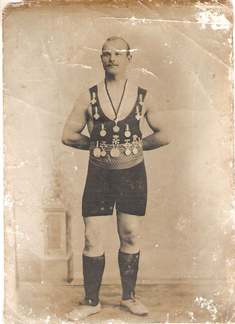 Billede af Carl Marinus Jensen - i position med medaljer - brydning